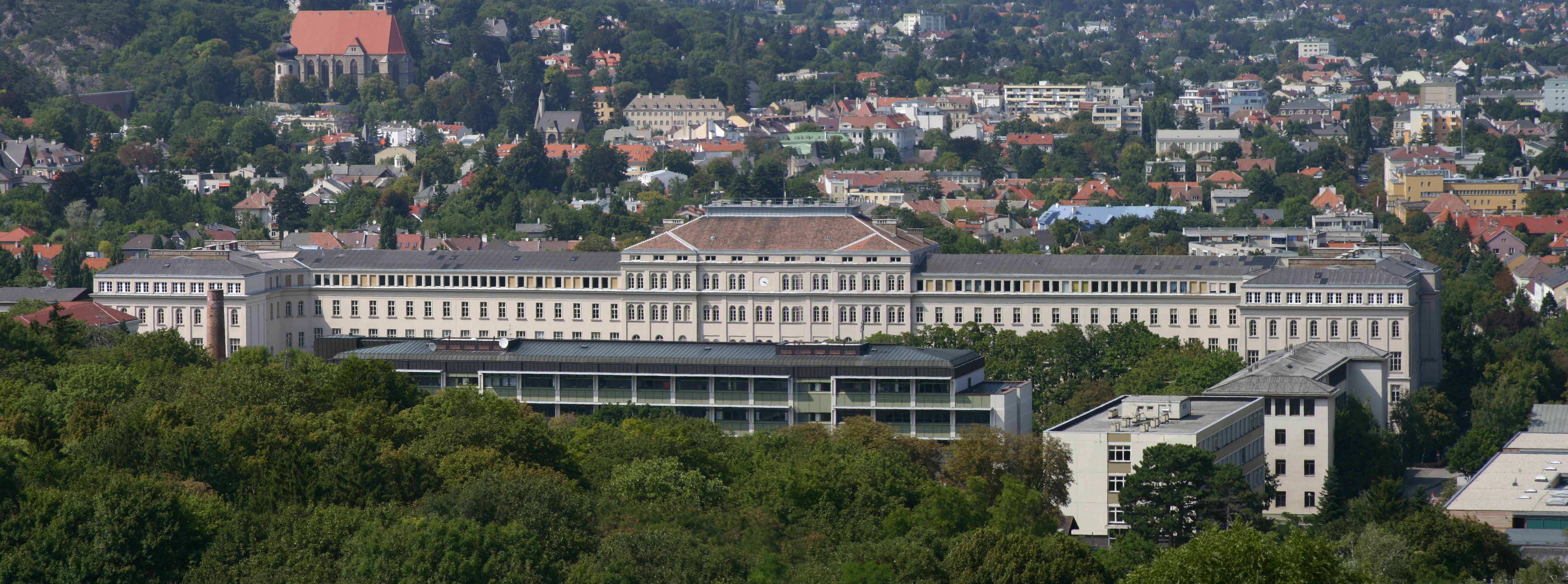 HTL Mödling Südansicht